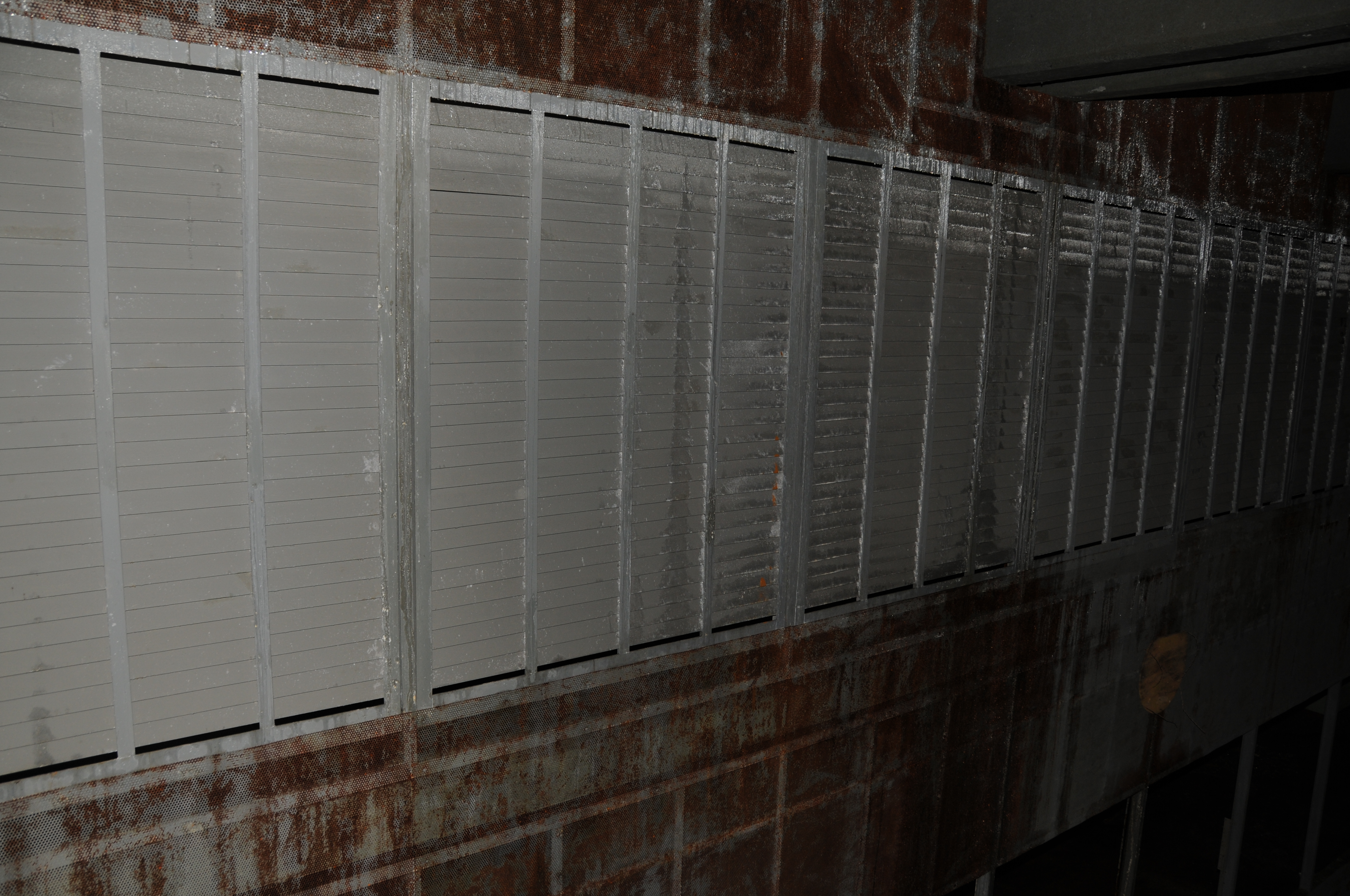 Détails des totes dans la salle d'opérations. Salbert hill fortifications. Old NATO station.